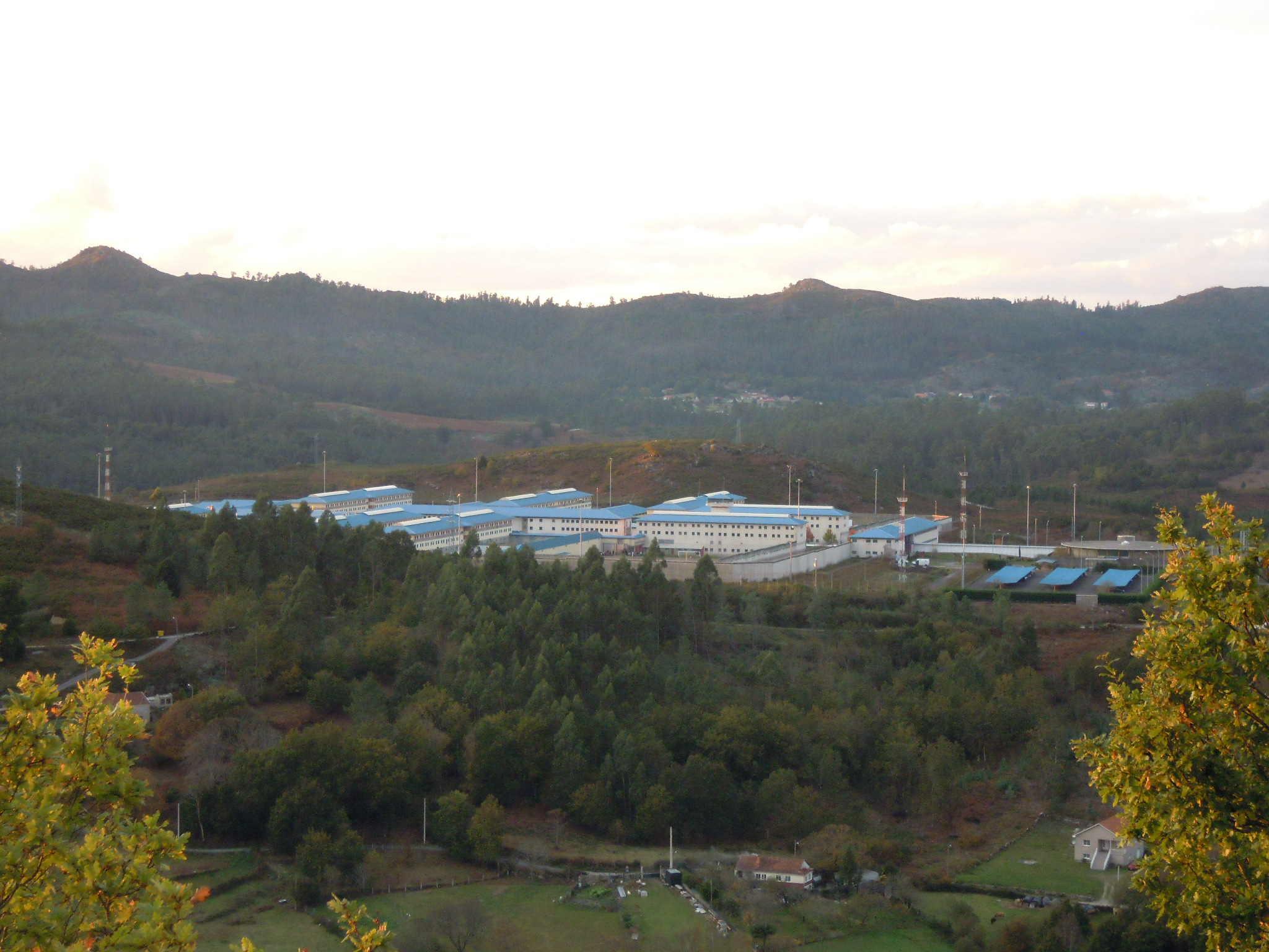 Centro penitenciario da Lama (A Lama).